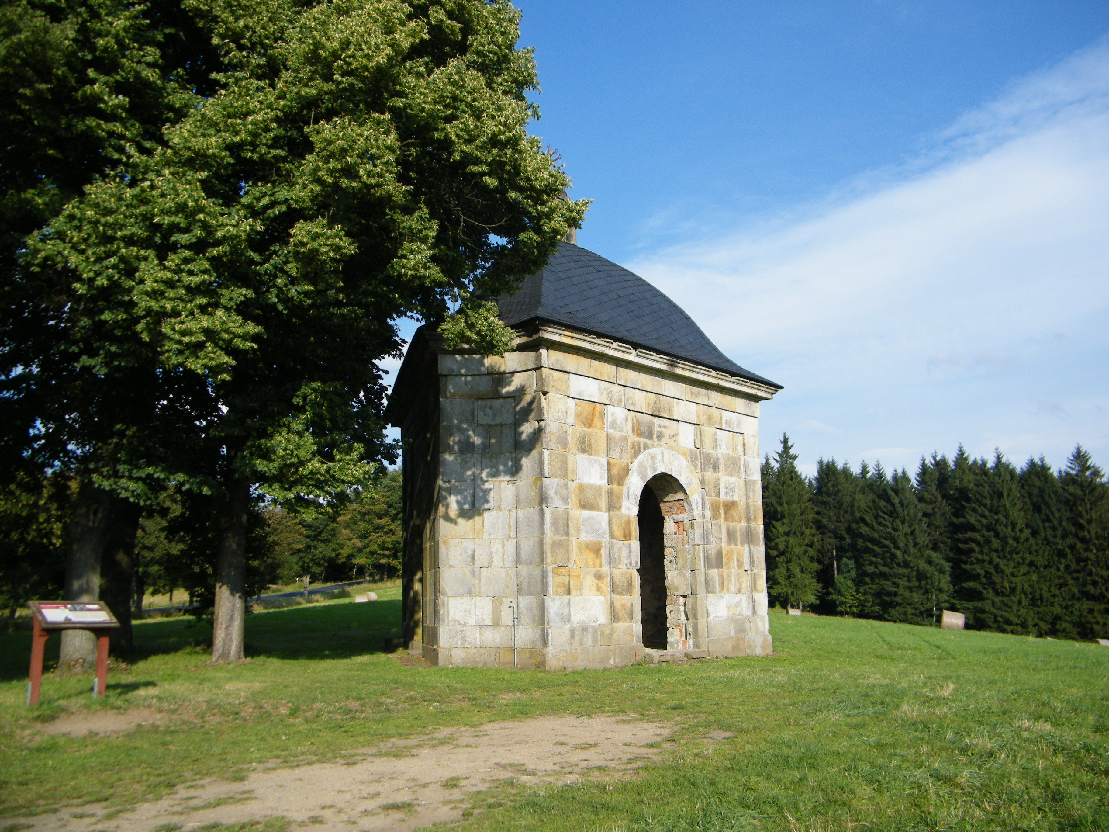 Kaple Nejsvětější Trojice v Mikulášovicích